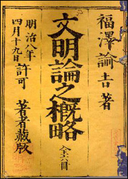 福澤諭吉の著書、文明論之概略』（1875年）